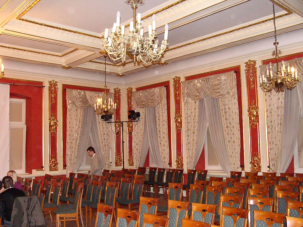 Sala Kominkowa w Klubie XIII Muz (Pałac pod Głowami) w Szczecinie